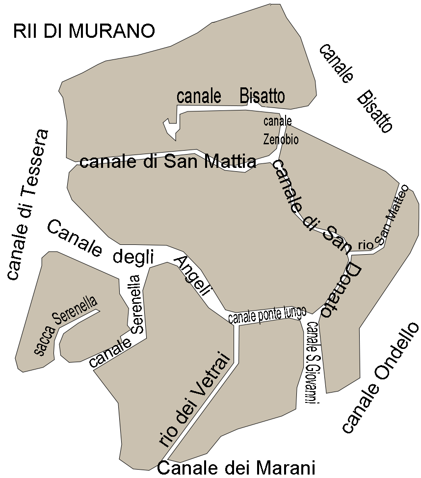 Plan des rio de Murano